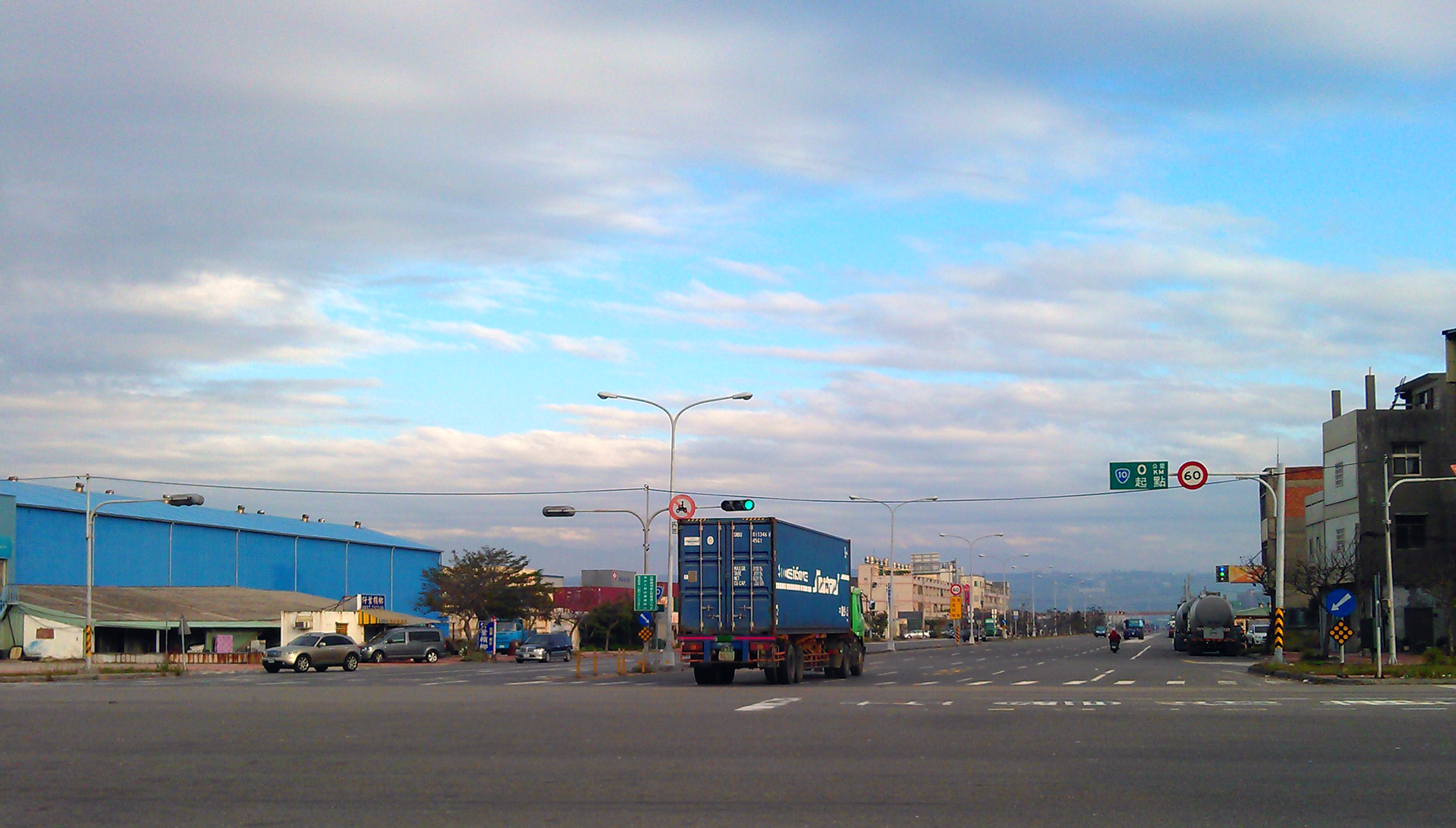 中文（台灣）: 省道10號起點